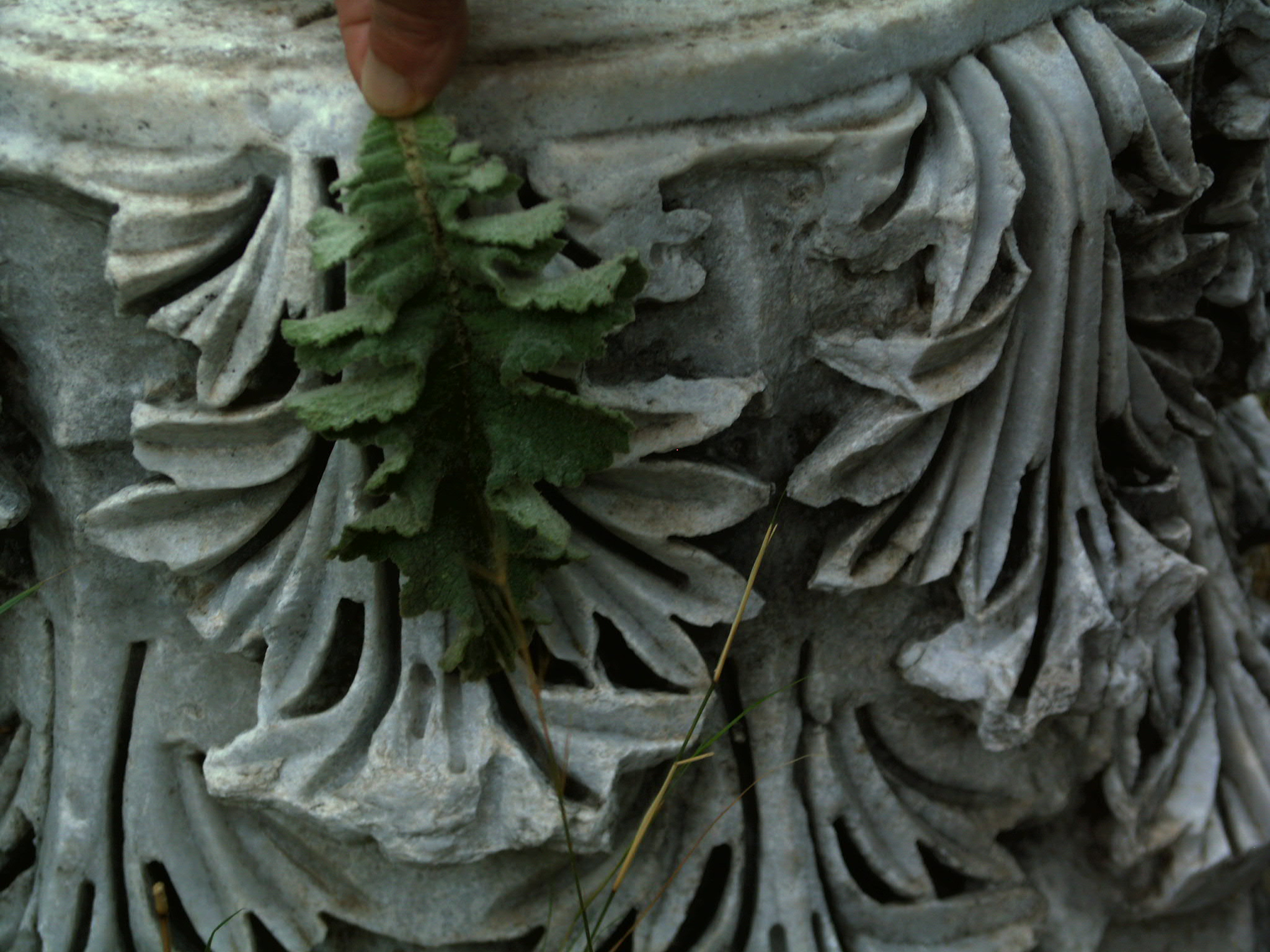 Akantusblatt im Vergleich mit Säulenkapitell